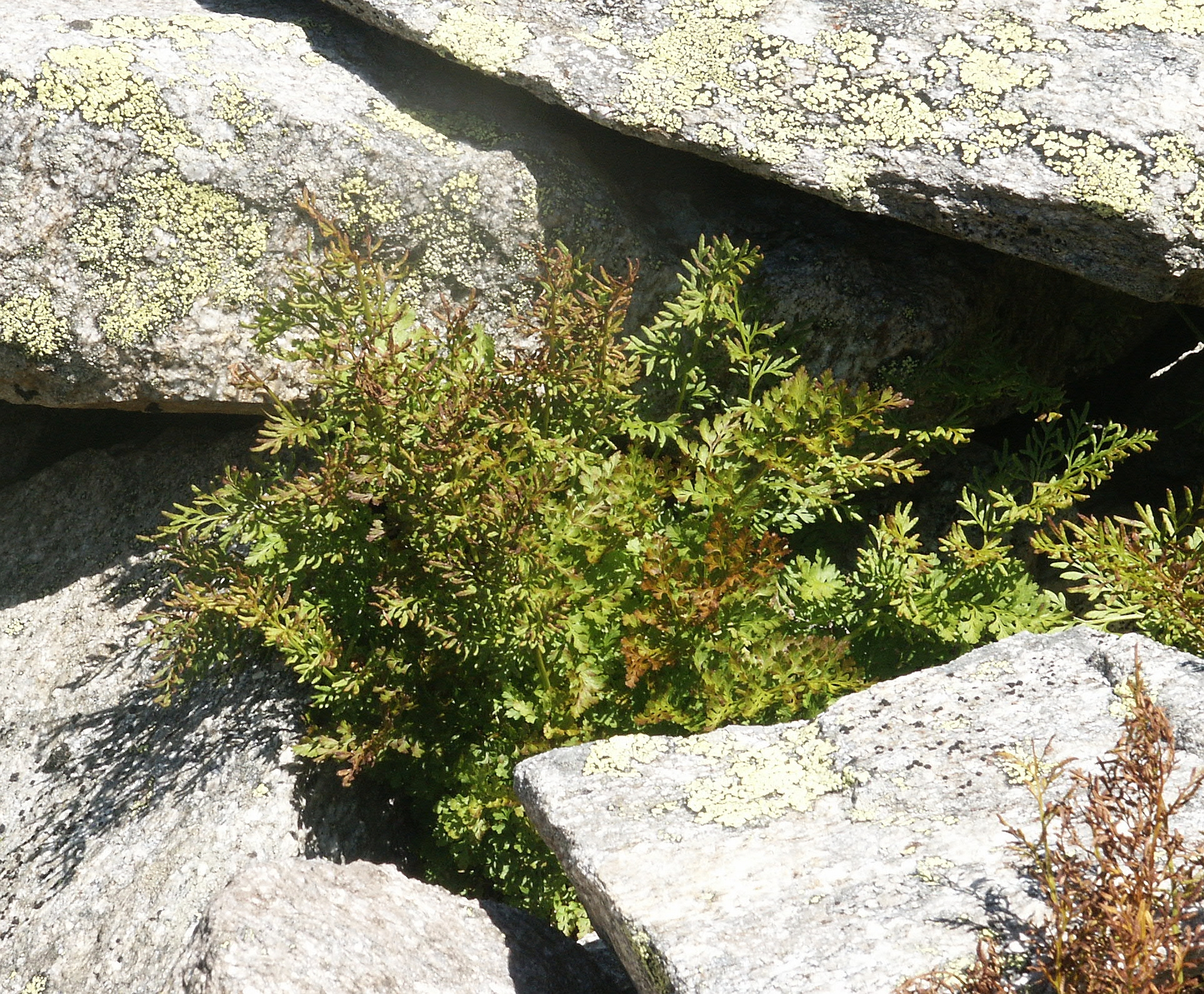 Cryptogramma crispa, Zillertaler Alpen, Italien